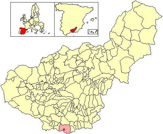 Situación de la localidad de Las Ventillas (en el municipio de Motril) respecto a la provincia de Granada, en España.